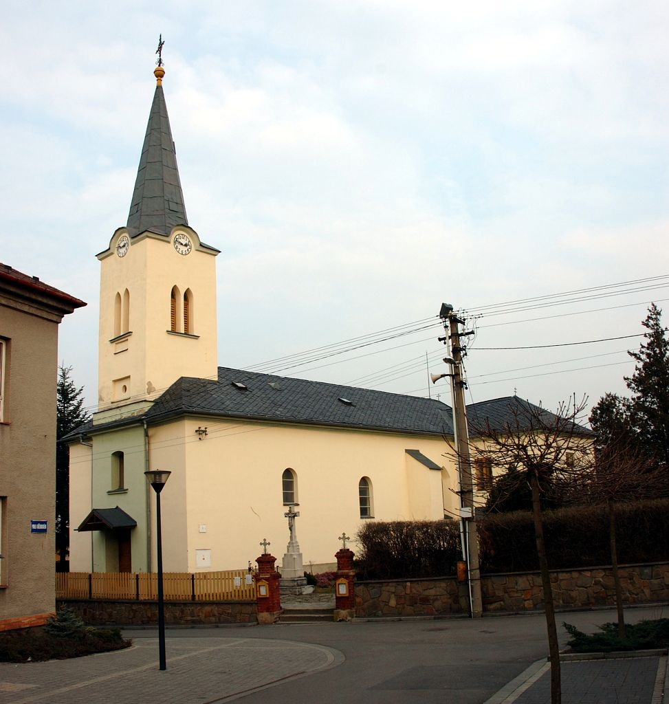 kostel sv. Jana Křtitele, Mokré Lazce